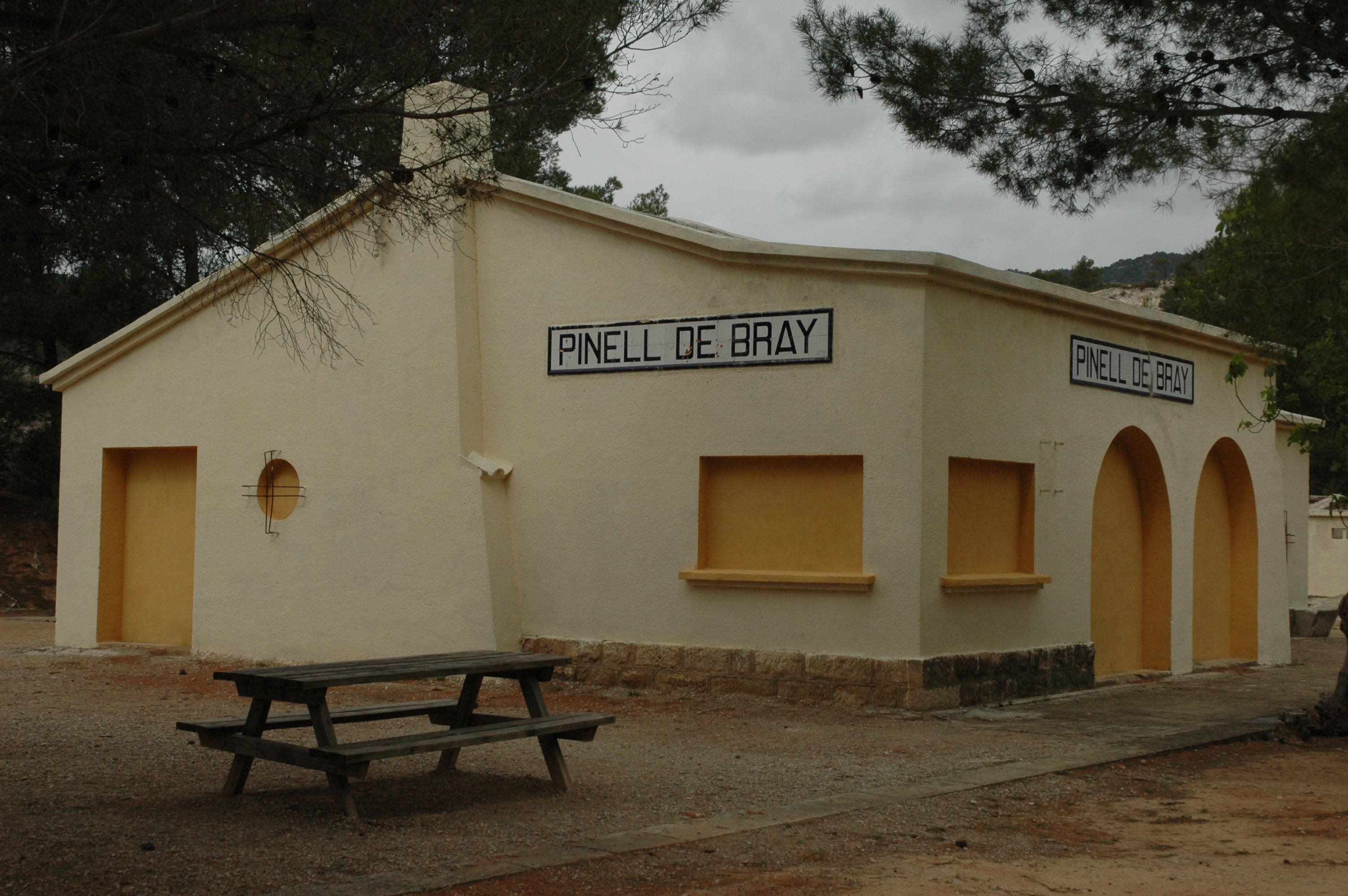 Antigua estación de Pinell de Bray, perteneciente al ferrocarril del Val de Zafán.